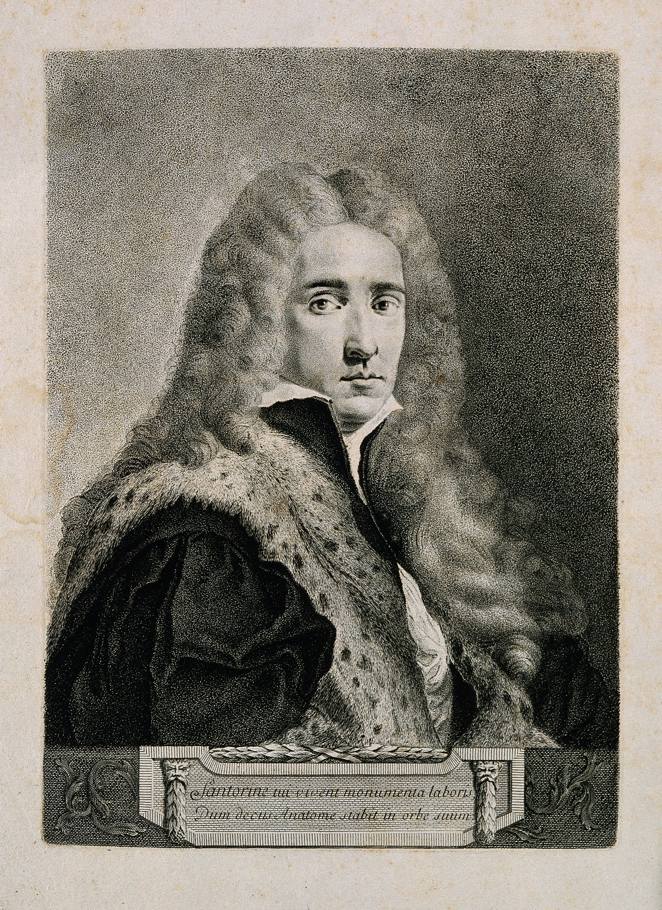 Giovanni Domenico Santorini. Stipple engraving. Iconographic Collections Keywords: portrait prints; Giovanni Domenico Santorini; stipple prints